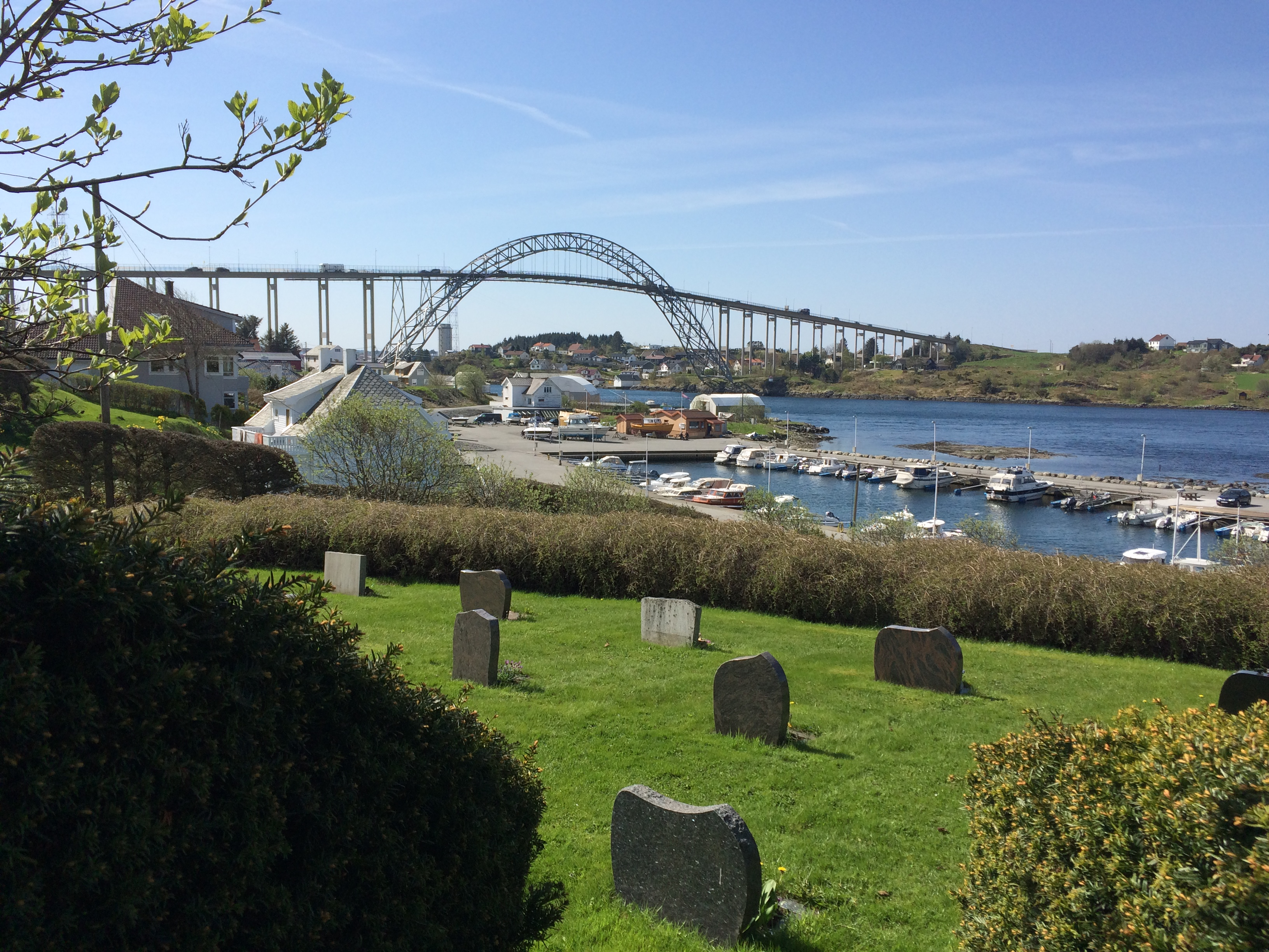 Karmøybroen sett fra Norheim gravplass